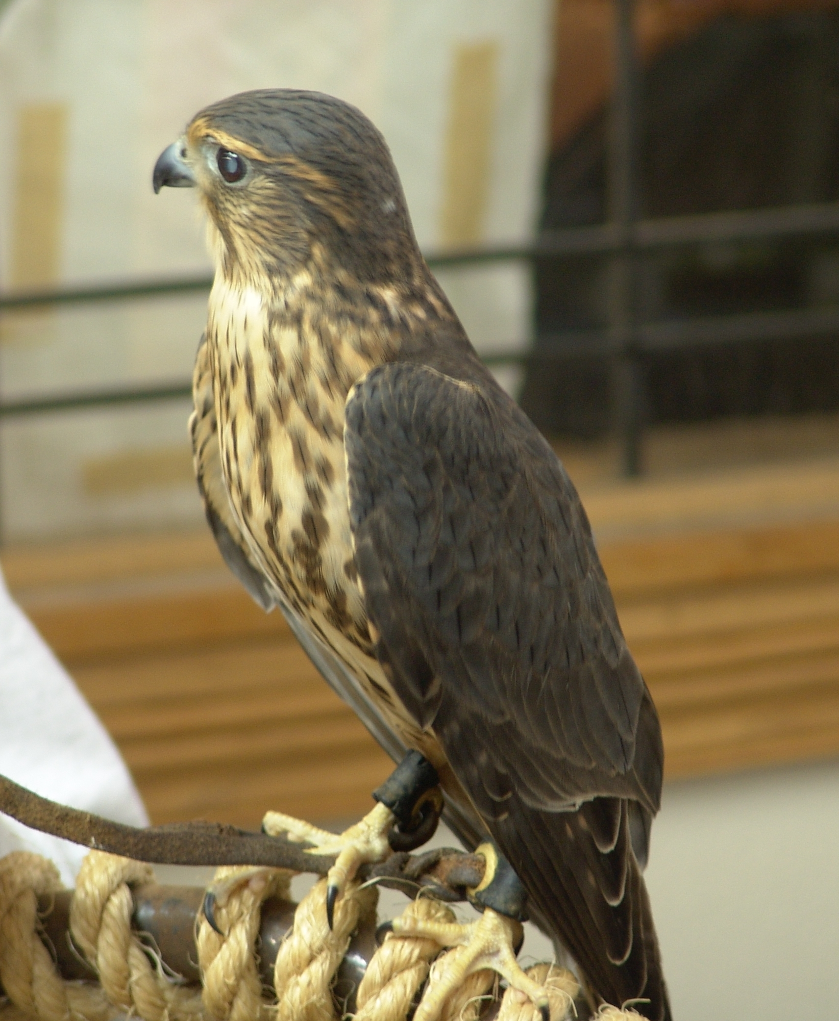 Falco columbarius ?columbarius Colorado Raptor Center, Fort Collins CO.